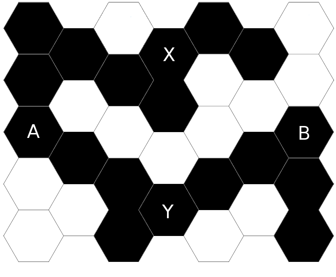 Illustration der FKG-Ungleichung: Vorausgesetzt, dass es bereits den einen schwarzen Pfad von A nach B gibt, wird die Existenz eines Pfades von X nach Y wahrscheinlicher.